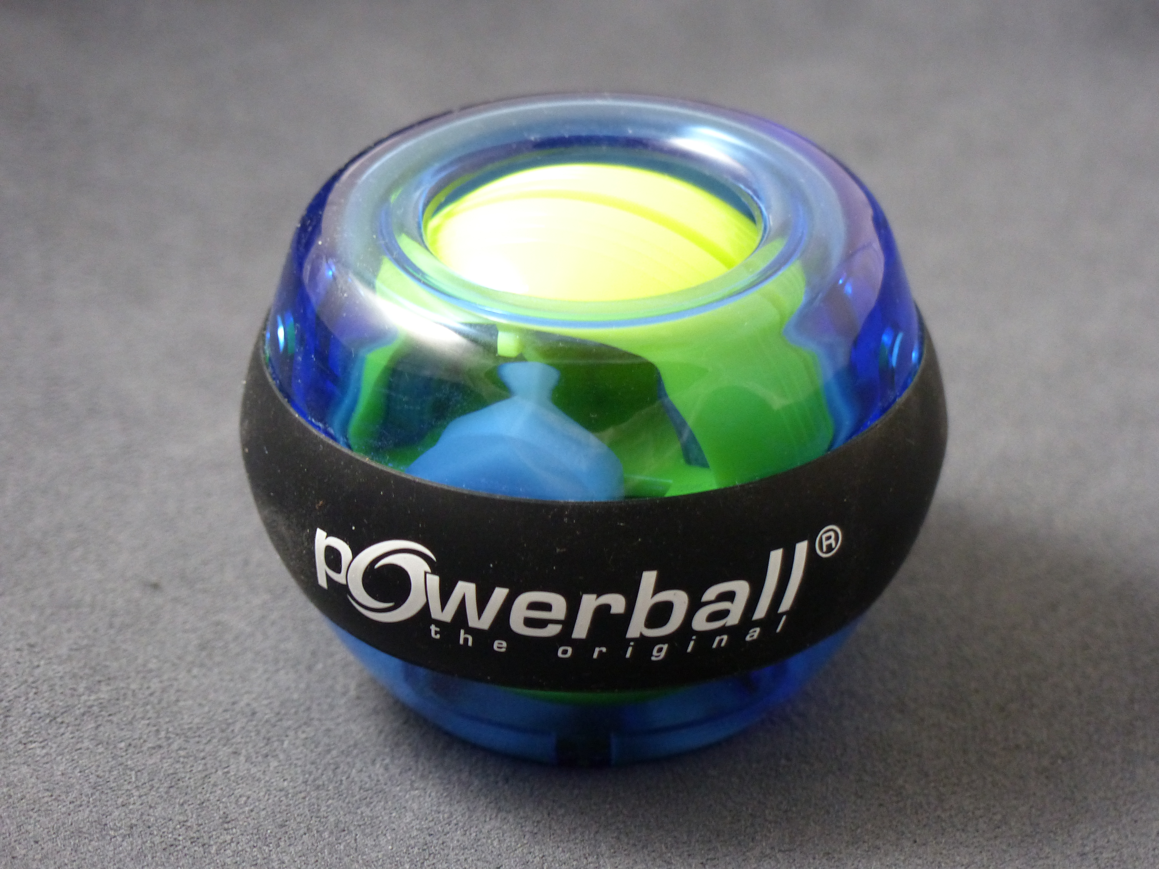 Powerball